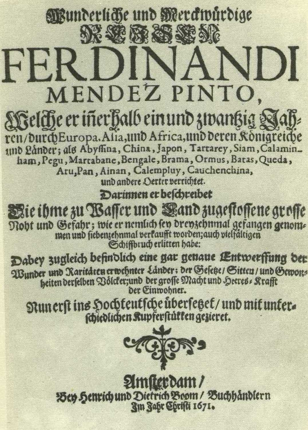 Titelblatt der ersten deutschen Übersetzung der Peregrinacao. Erschienen 1671 Amsterdam